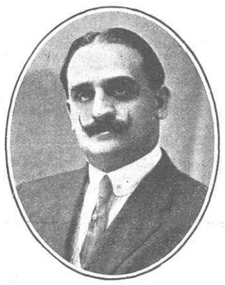 Antonio Goicoechea